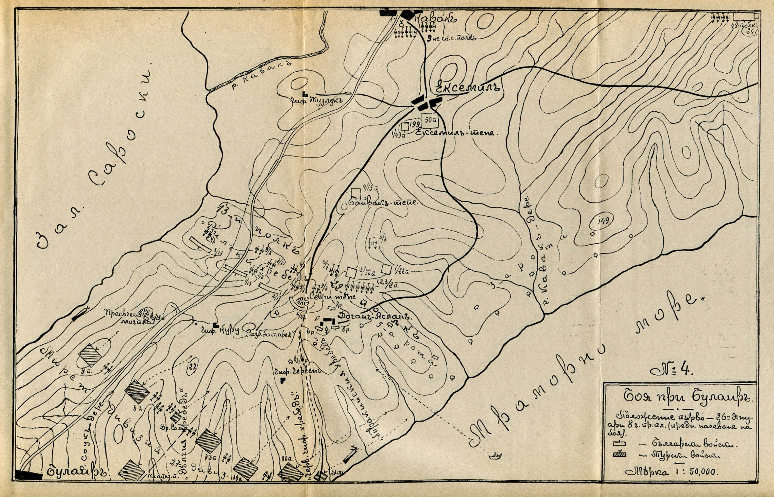 Битката при Булаир. Разположение на силите преди началото на боя.